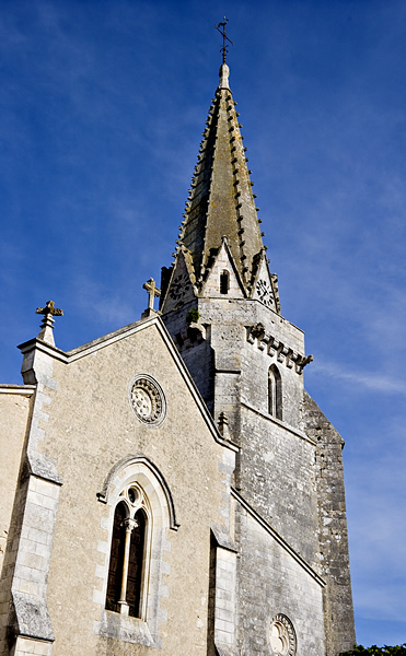 Clocher de l'église de Sainte-Marie-de-Ré - Île de Ré - Charente Maritime